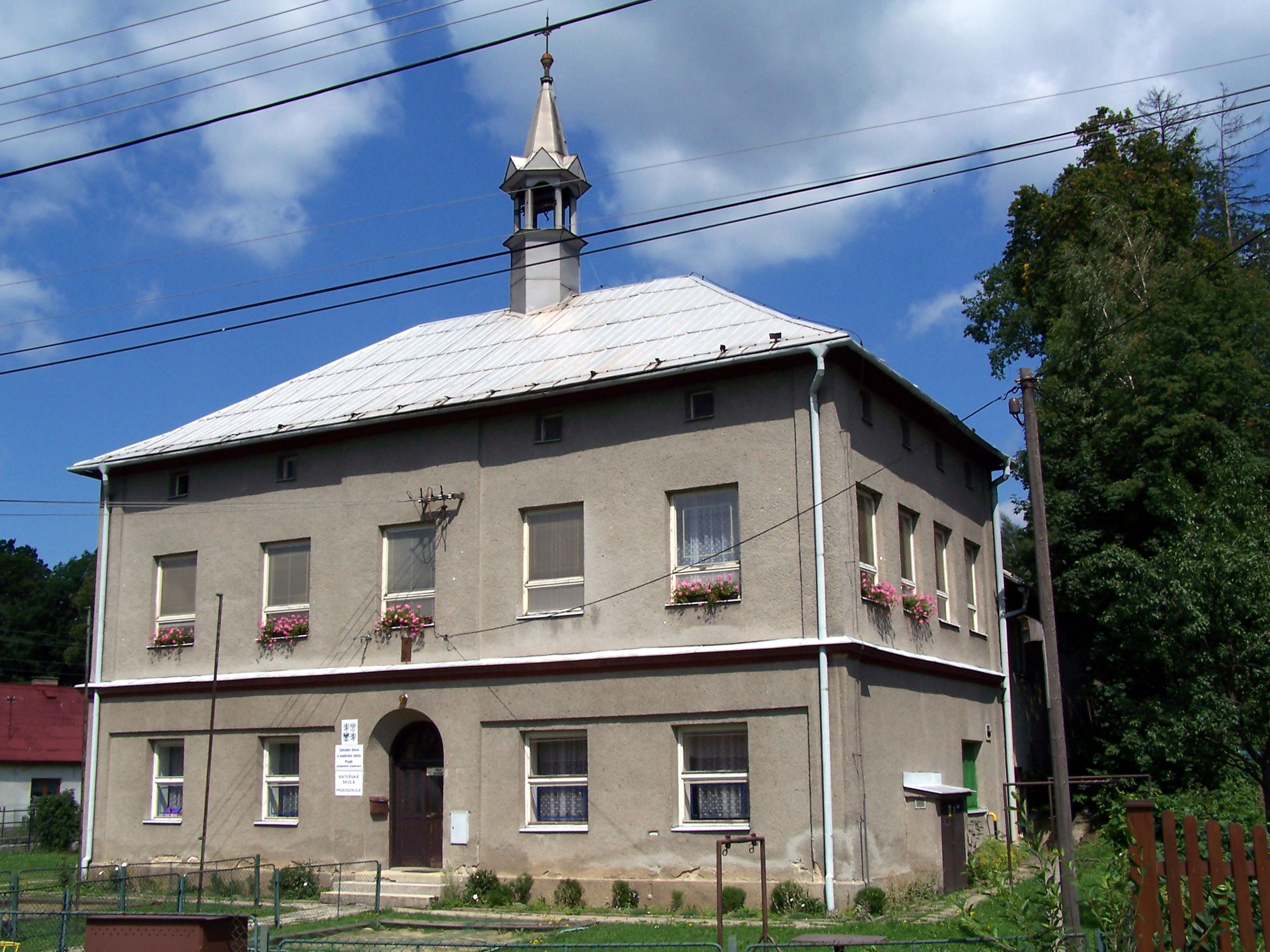 Elementary school and kindergarten in Písek (Piosek), Czech Republic